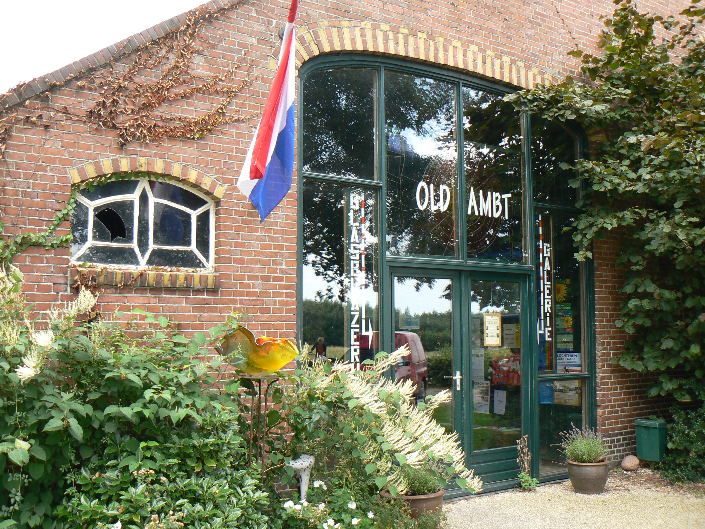 Glass art/glassblowing studio Oldambt, Hamdijk in Nieuweschans (Reiderland)/The Netherlands